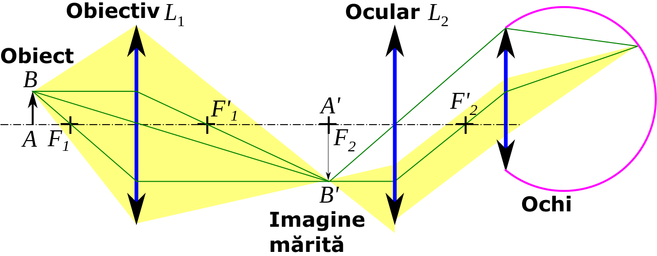 Obiectul este AB, iar imaginea mărită este A'B'. Razele de lumină sunt marcate cu verde.